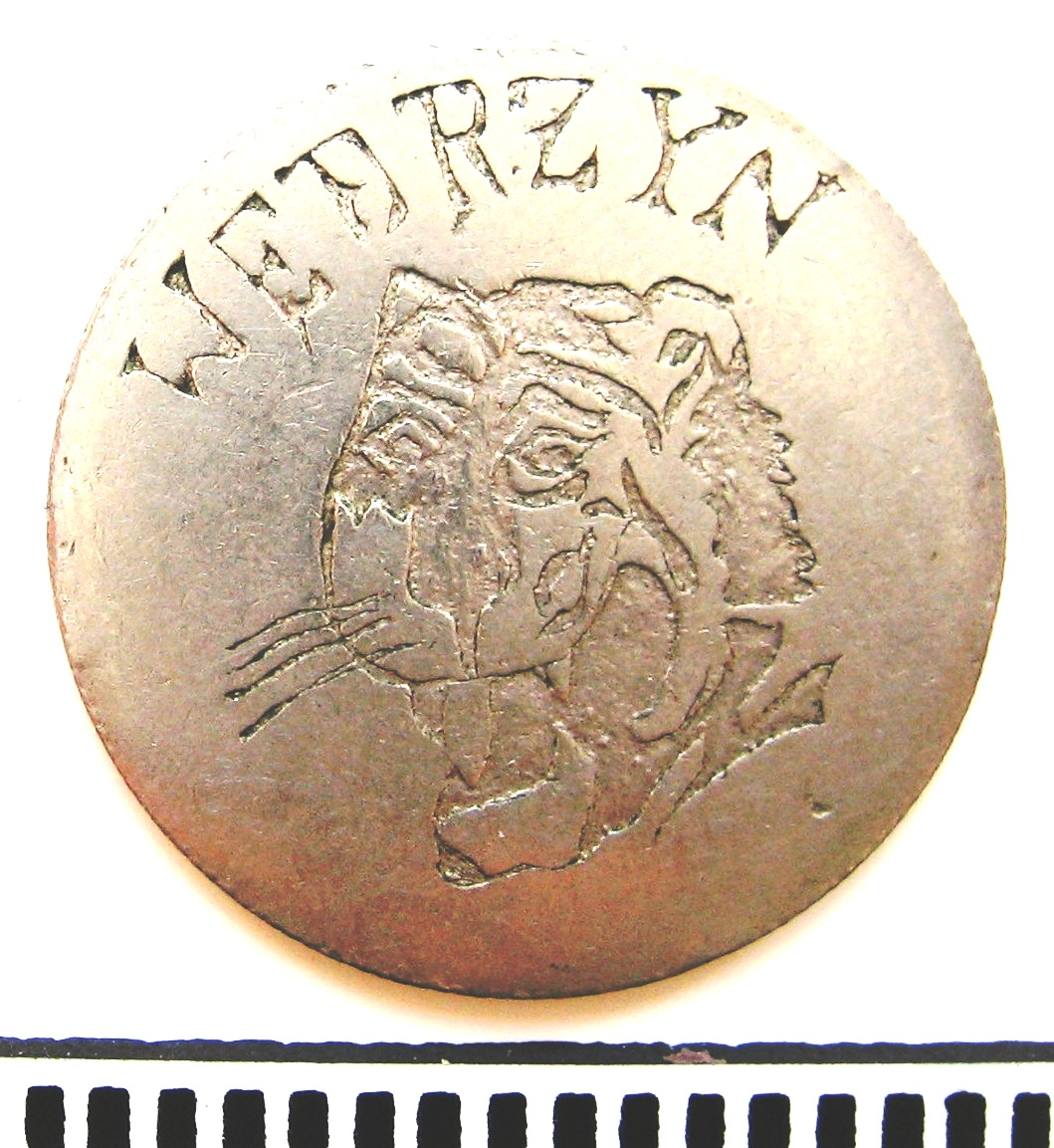 Medal wykonany z monety o nominale 20 zł przez żołnierzy z 9 Oddziału Dyscyplinarnego w Wędrzynie. Medal przysługiwał żołnierzom, którzy w wymienionej jednostce wojskowej odbyli co najmniej 60 dni kary służby w oddziale dyscyplinarnym.